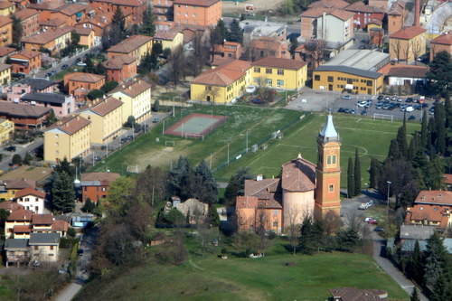 Zola Predosa vista dall' alto